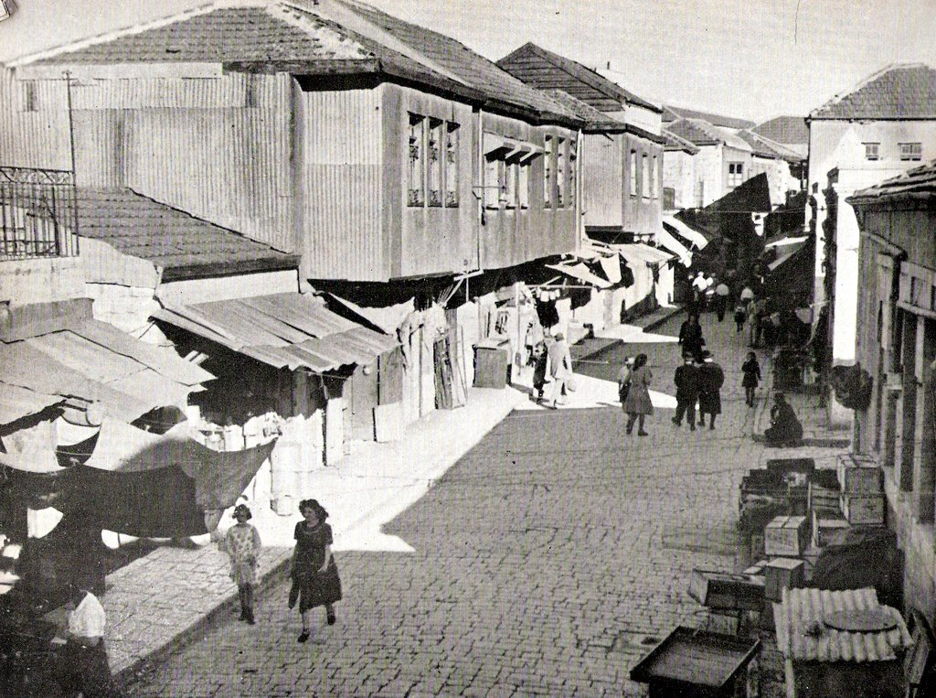 רחוב עין יעקב בשכונת מאה שערים בירושלים בשנת 1950 לערך.